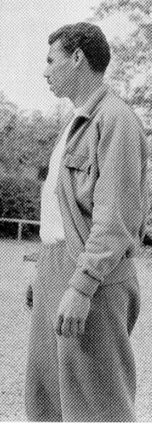 Abdelaziz Ben Tifour pendant la tournée de l'équipe du FLN de football.